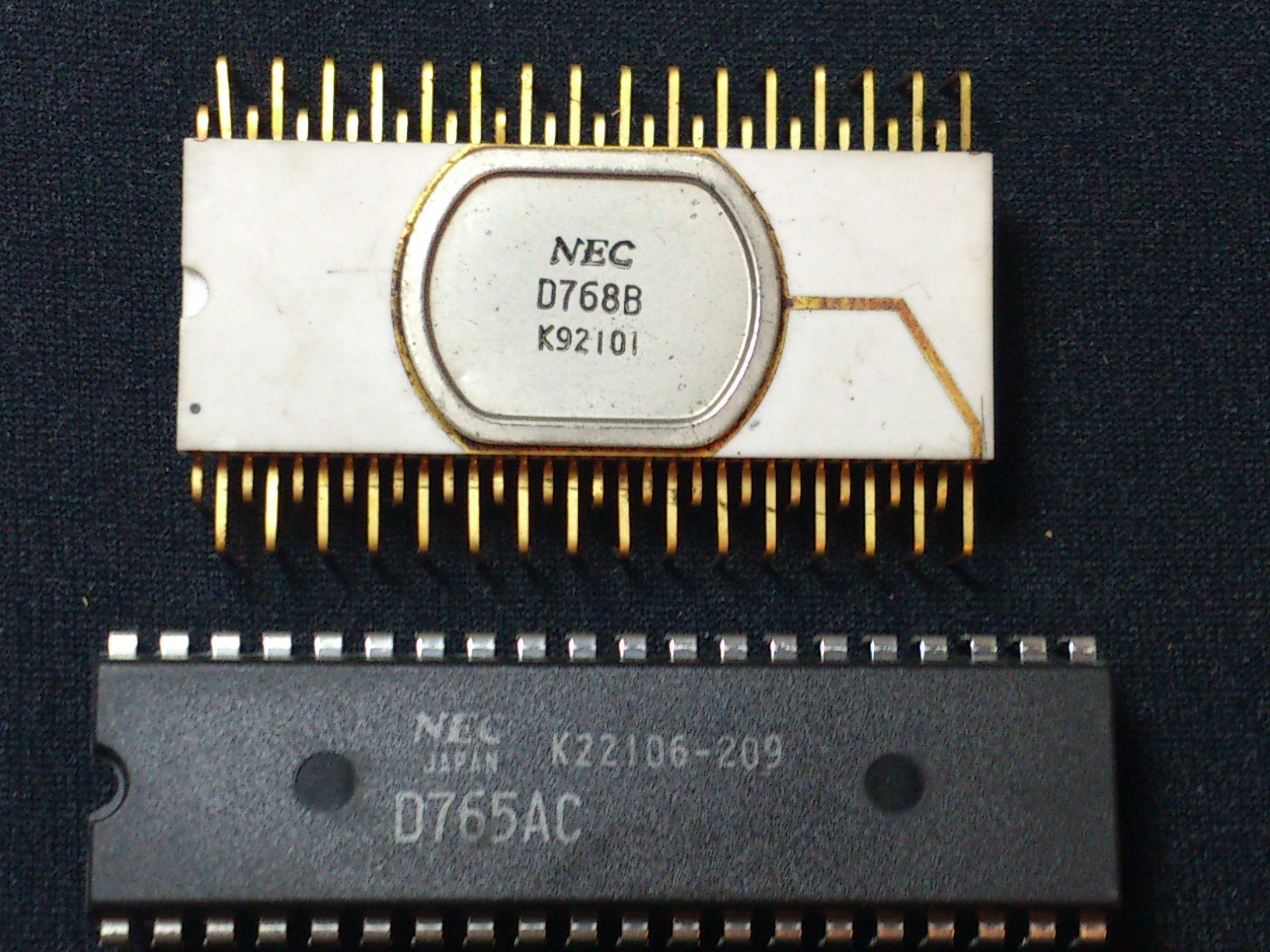 μPD768D(μCOM-1600)Chip